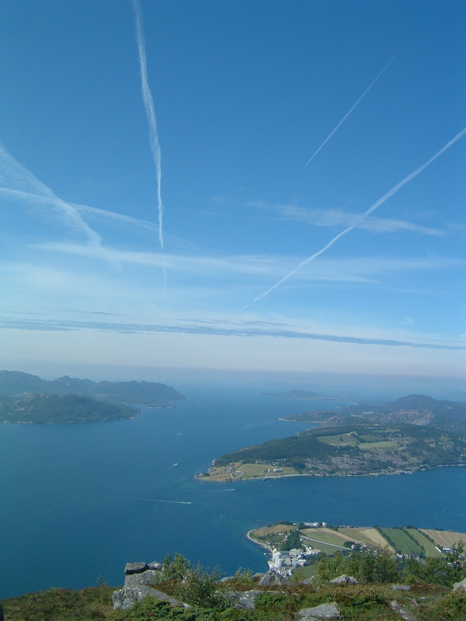 Oanes og Forsand sett fra Uburen